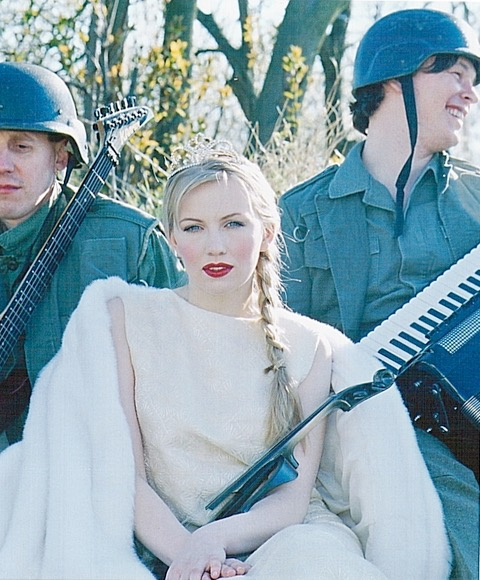 Camille & The Band